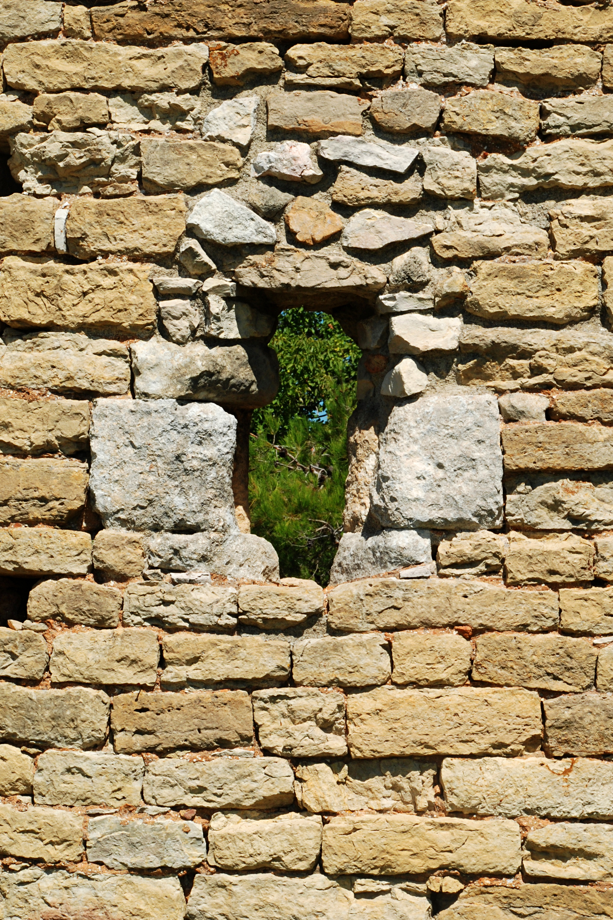 France - Gard - Chapelle Saint-Martin de Saint-Victor-la-Coste